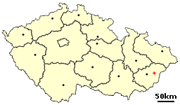 Valašská Polanka na mapě České republiky